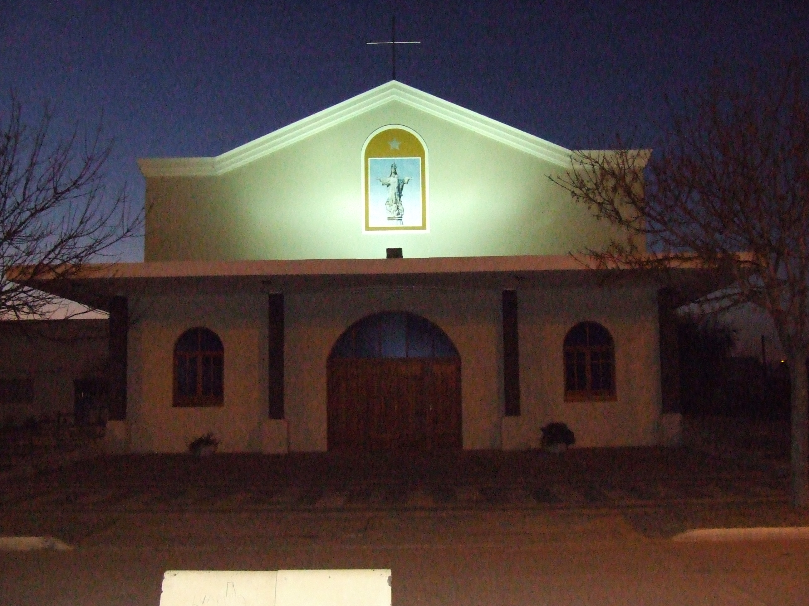 IGLESIA DE TACURAL (Pcia. Santa FE)